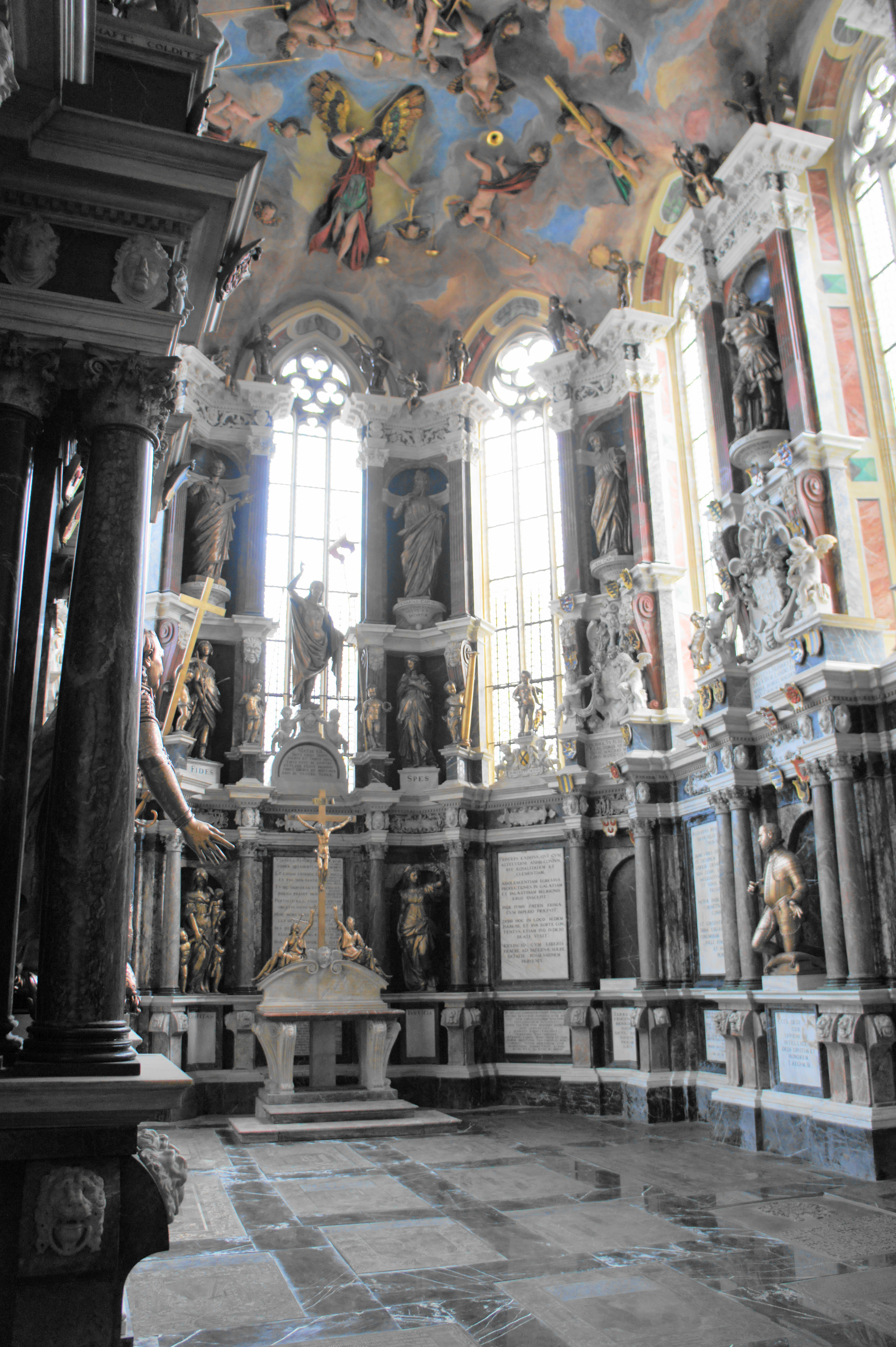 Der Dom zu Freiberg; Begräbniskapelle, Grabmal des Kurfürsten Moritz von Sachsen